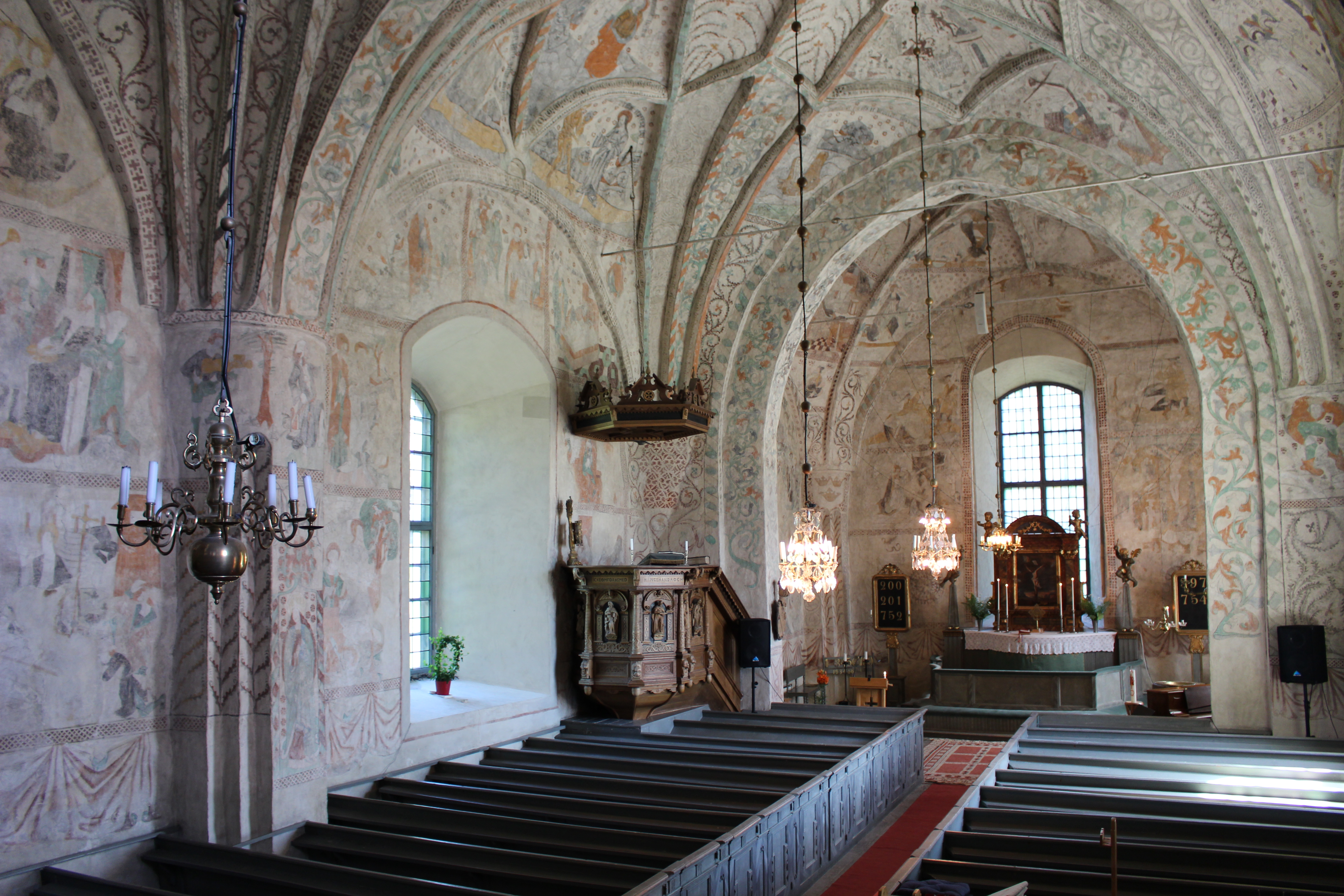 Kyrkorum i Rasbokils kyrka